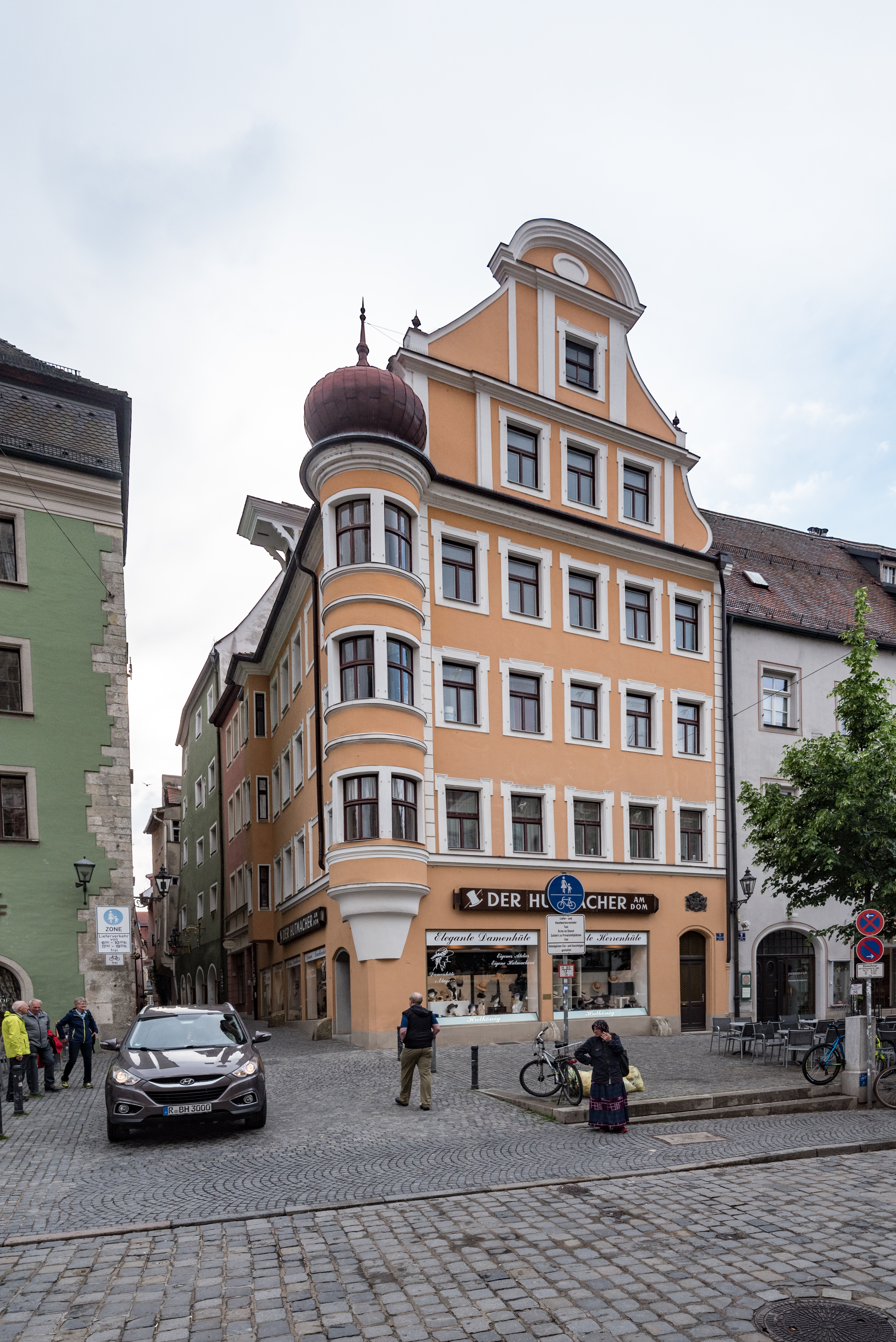 Regensburg, Krauterermarkt 1